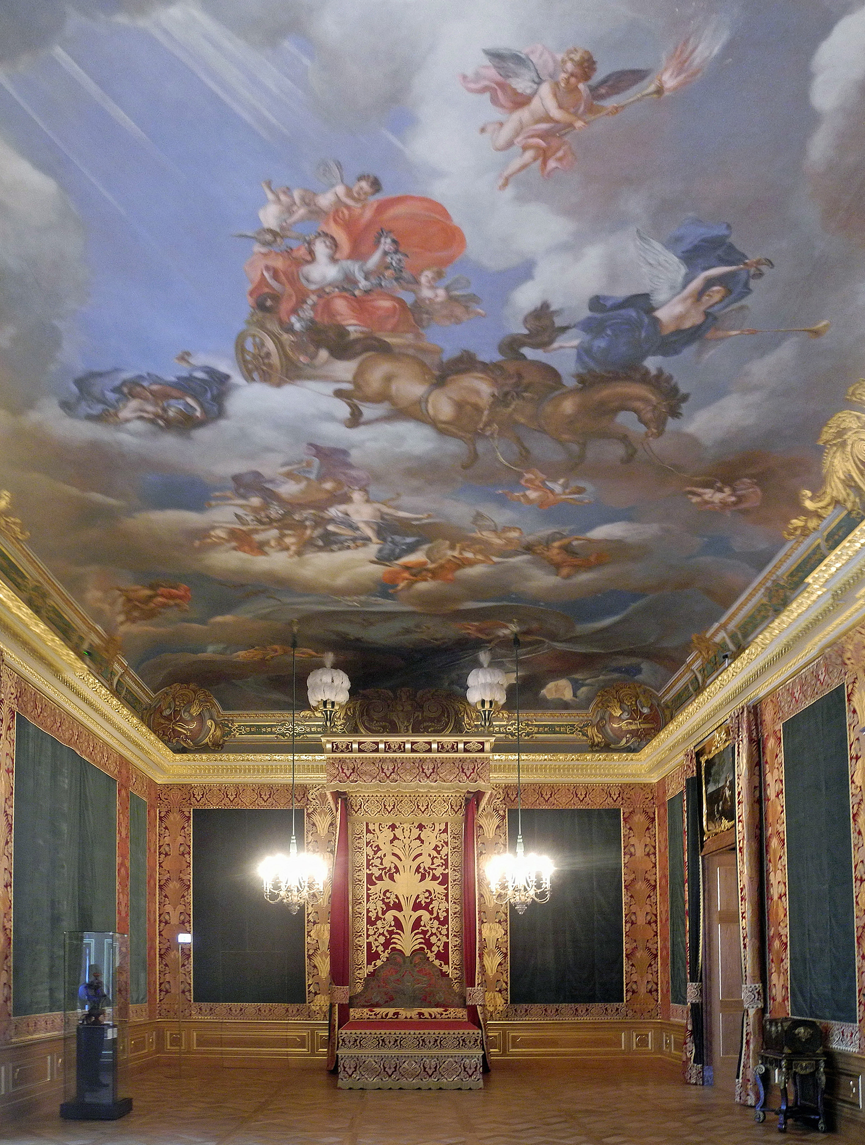 Die Königlichen Paraderäume im Residenzschloss Dresden am Eröffnungstag 28. September 2019 – Paradeschlafzimmer mit dem Prunkbett und dem Deckengemälde „Aurora, die Welt erweckend“ (urspr. von Louis de Silvestre, 1715)